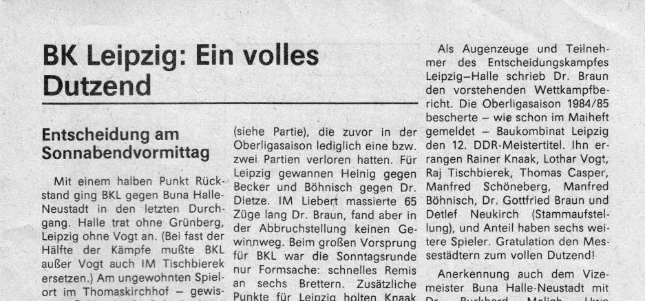 Zeitschrift SCHACH 1985, Heft 6, Seite 255 (oben). "Baukombinat Leizig holte den 12. DDR-Meistertitel" im Mannschaftsschach.